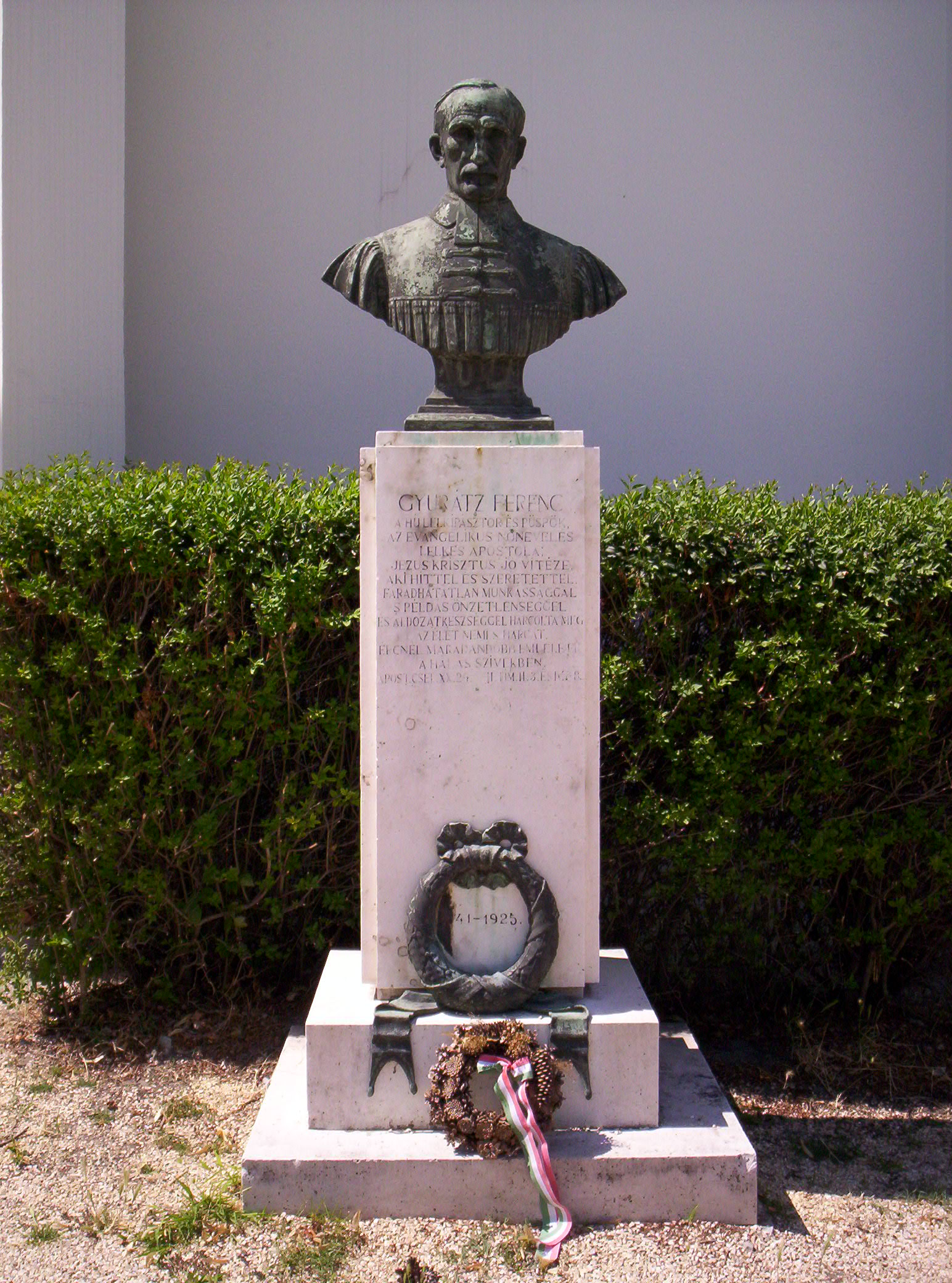 Bust of Lutheran bishop Ferenc Gyurátz in front of the Lutheran church in Pápa, inaugurated in 1932. Gyurátz Ferenc evangélikus püspök mellszobra a pápai evangélikus templom előtt. 1932-ben avatták fel.